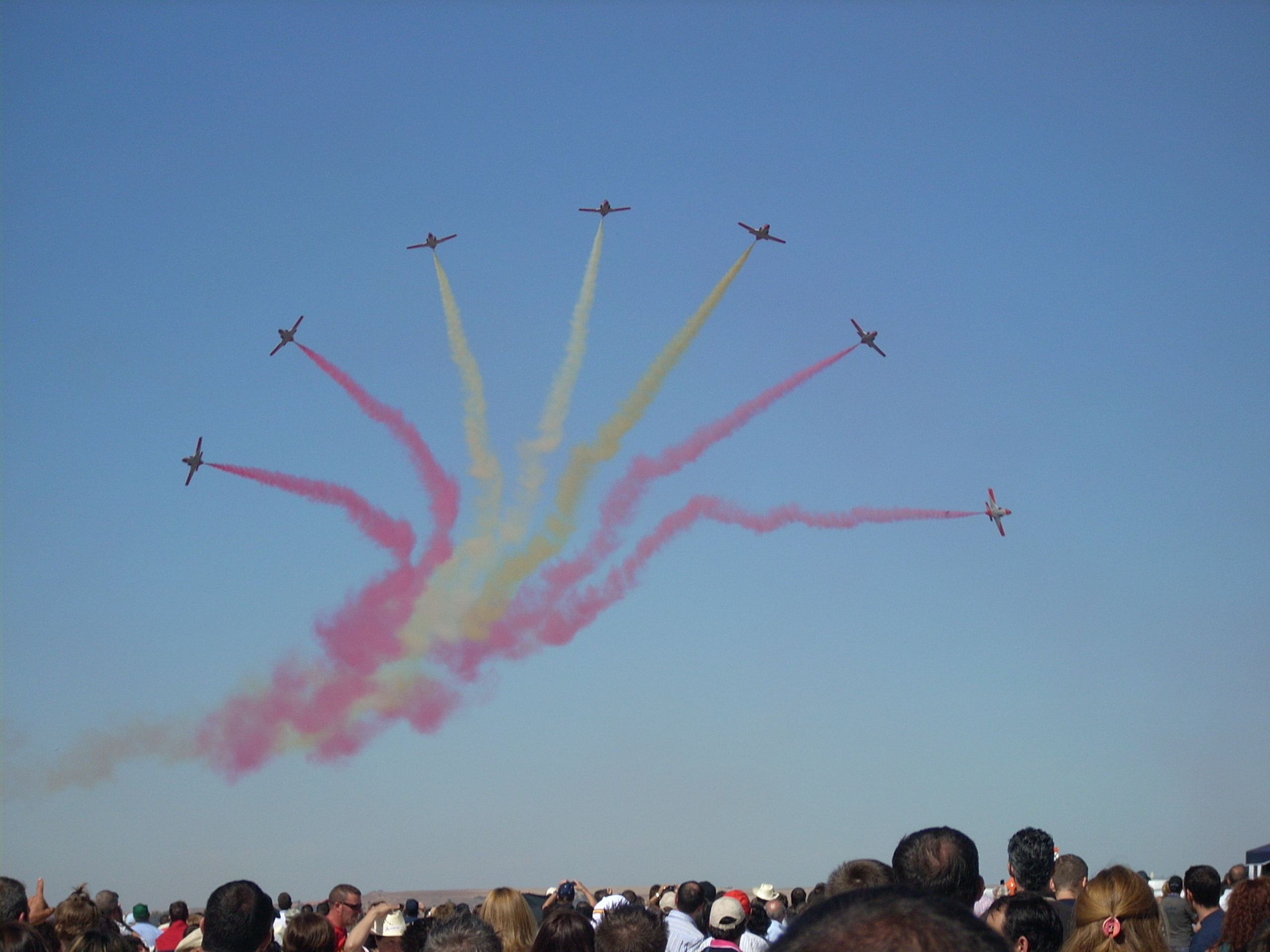 La patrulla aguila ejecuta un ejercicio.